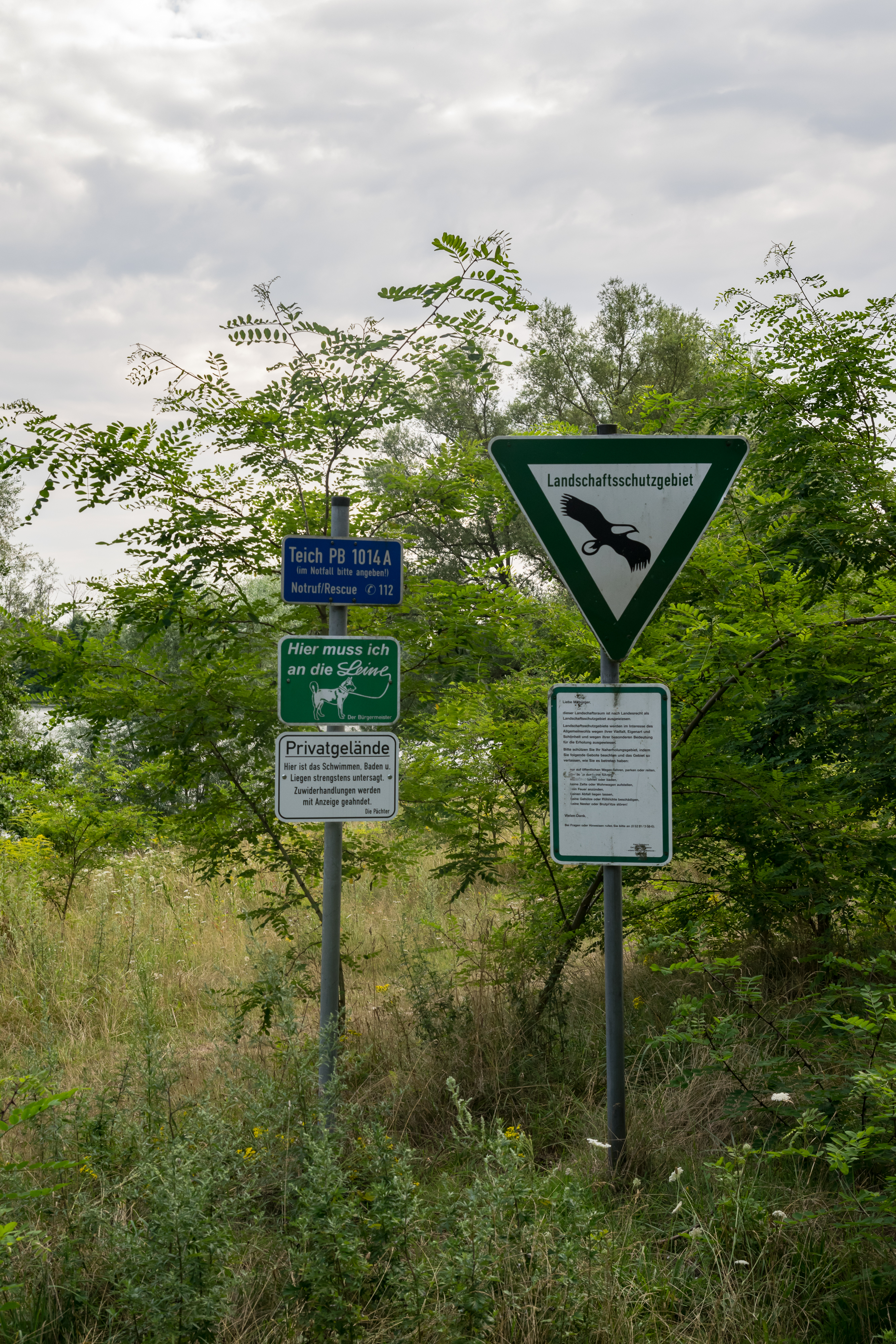 Landschaft am Tallesee bei Schloß Neuhaus, LSG Seen in der Lippeniederung, Kreis Paderborn